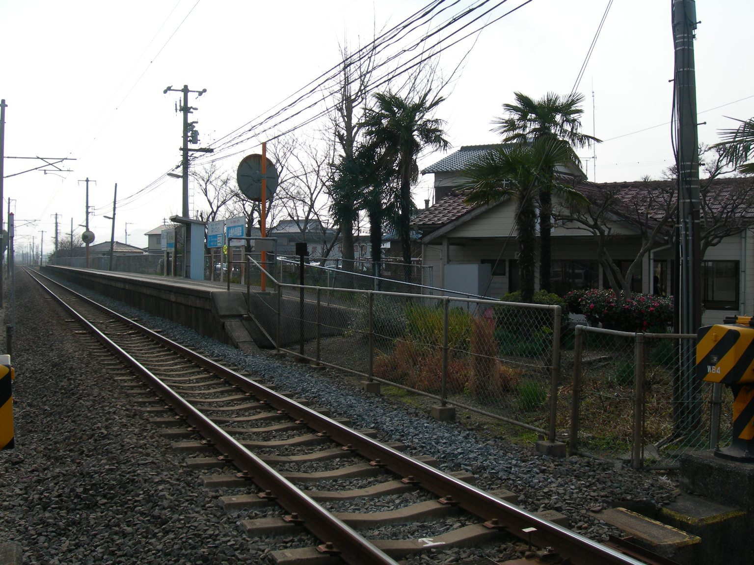 みの駅プラットホーム